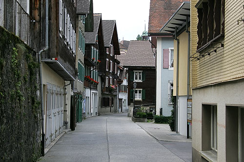 Stans: Schmiedgasse (Freie Republik)